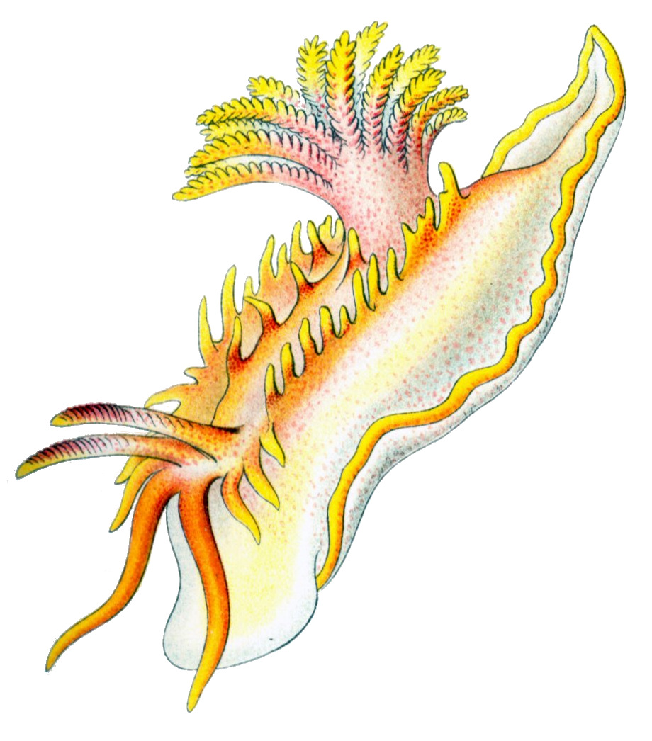 Idalia elegans (Leuckart) = Okenia elegans (Leuckart, 1828)